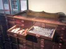 'Jan zijn beroemde rode ladekast'